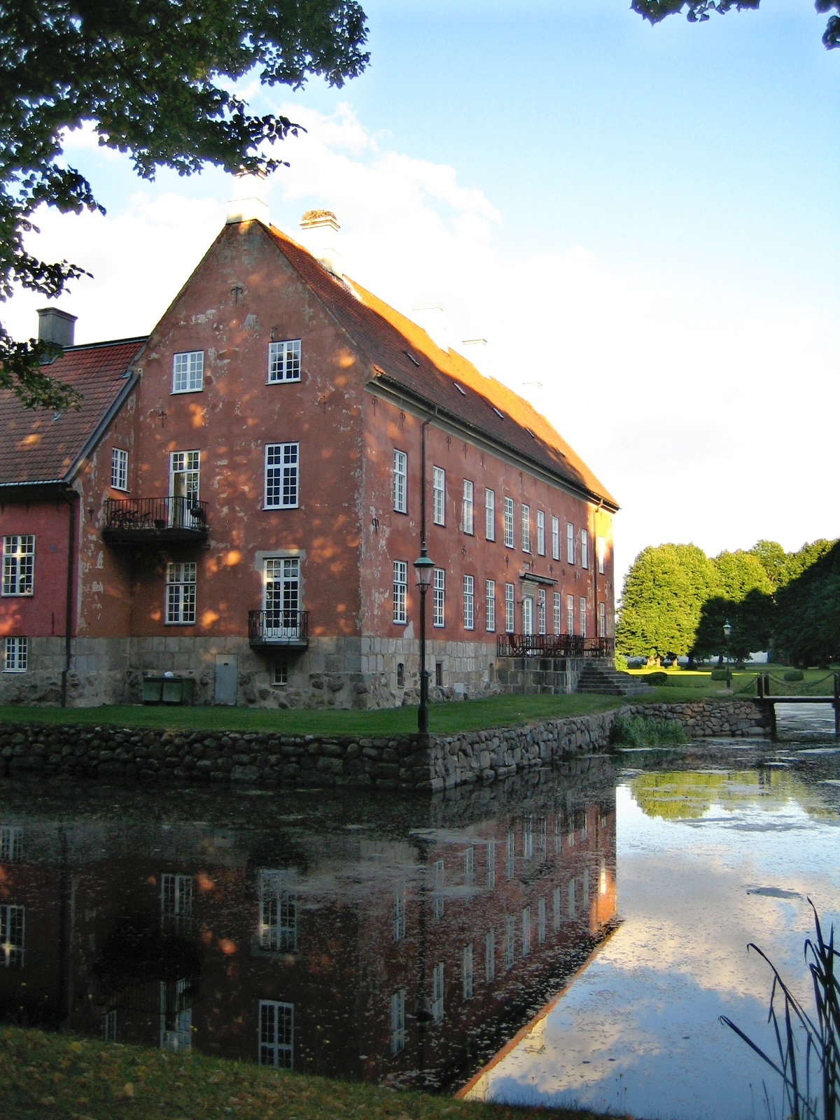 Viderups slott. Bilden tagen av mig själv 17 september 2005.